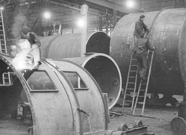 Zentralbild-Biscan 22.3.1960 Großbehälter für die Rekonstruktion in der Chemie-Industrie Der Schwermaschinenbau "Georgij Dimitroff" in Magdeburg hat eine große Aufgabe bei der Rekonstruktion in der chemischen Industrie und bei der Entwicklung des Aussenhandels der DDR zu erfüllen. Er hat sich auf den Bau von Großapparaten und Großbehältern für die Chemie spezialisiert und versorgt die chemische Industrie des sozialistischen Lagers. Auf einem Sondergebiet sind die Behälterbauer des Dimitroff-Werks dem Plan weit vorausgeeilt: beim Bau von Mahltrommeln für Zementrohrmühlen haben sie bereits 280% von dem erreicht, was sie bis März produziert haben sollten. UBz.: Blick in den Behälterbau des Dimitroff-Werks, wo die verschiedensten Großapparate und -Behälter für die Chemieindustrie gebaut werden. Im Hintergrund: ein Skubber für das Buna-Werk."